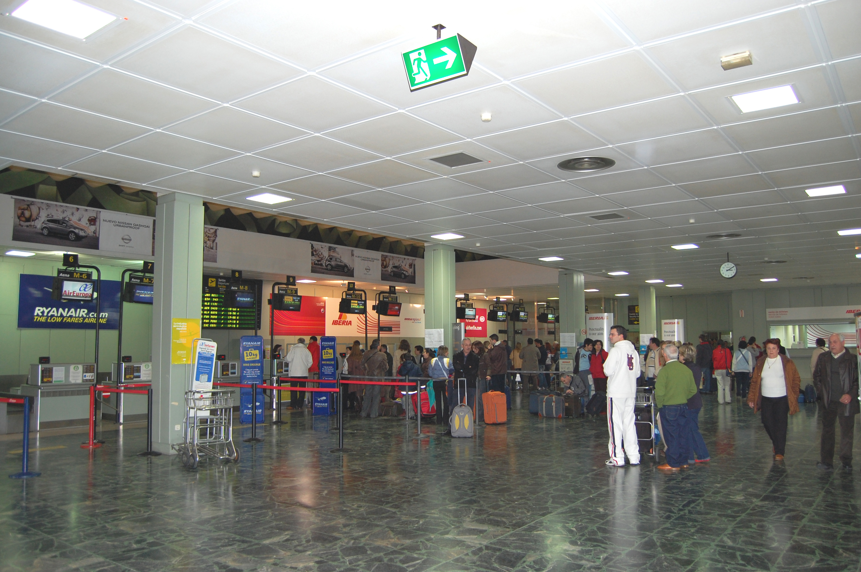 O Aeroporto de Santiago de Compostela, Galicia, Espanha.